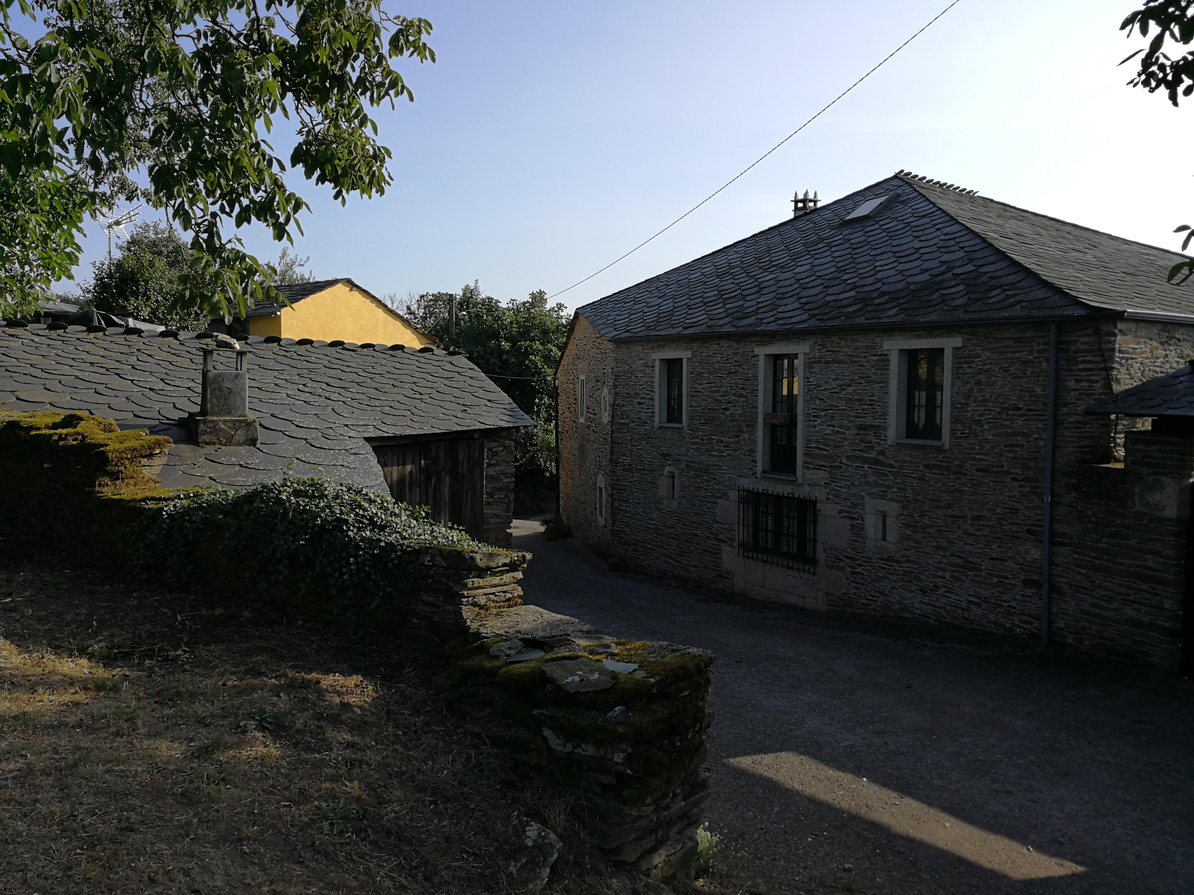 Lugar de Vilar do Monte, Parroquia de San Fiz de Reimóndez, concello de Sarria, Lugo